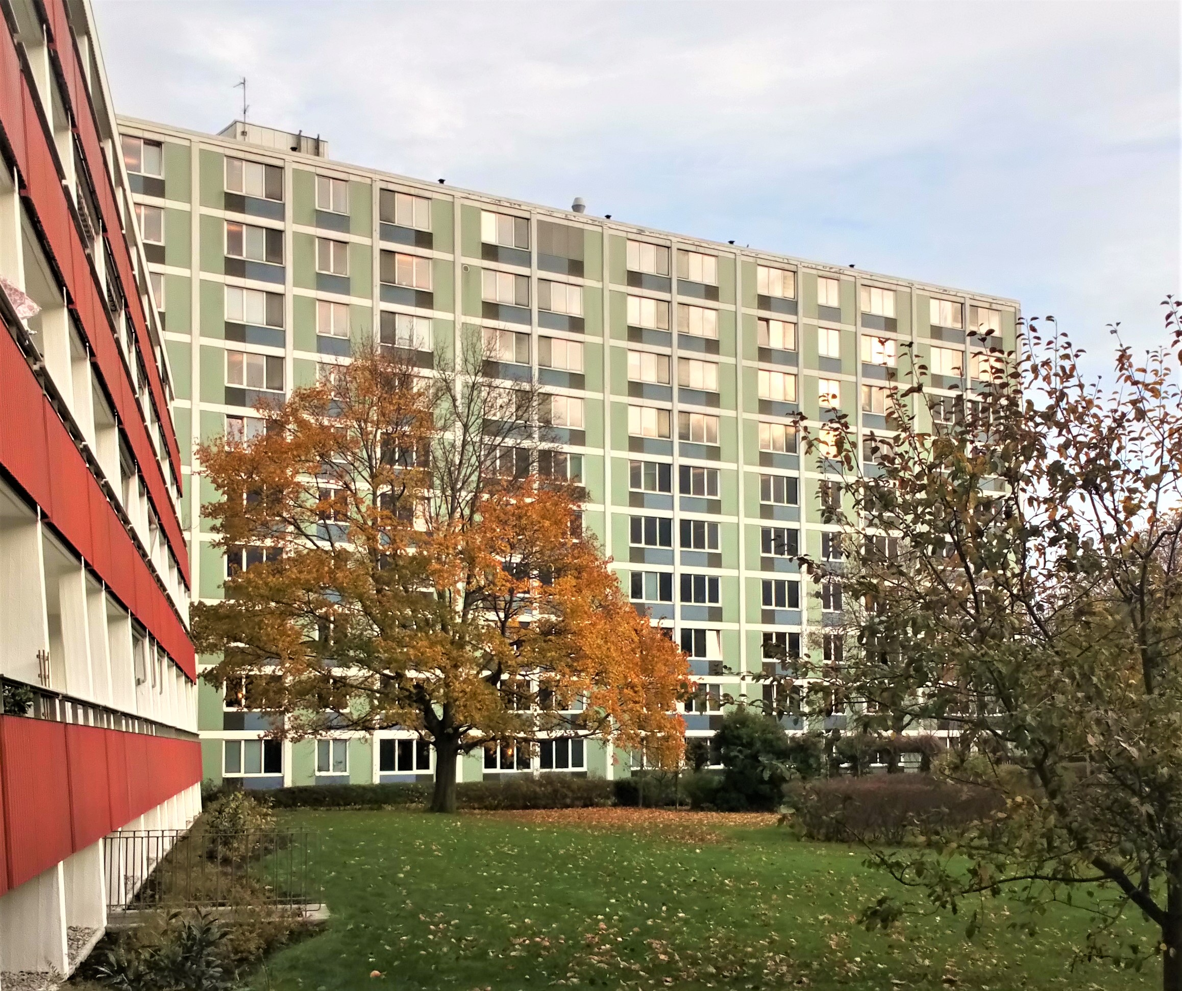 "Skatteskrapan" eller Hävdaryggen på Färnåkra i Lund 7 november 2019